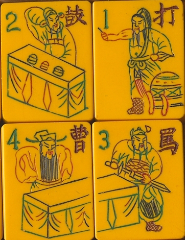 Foto van Mahjongstenen.